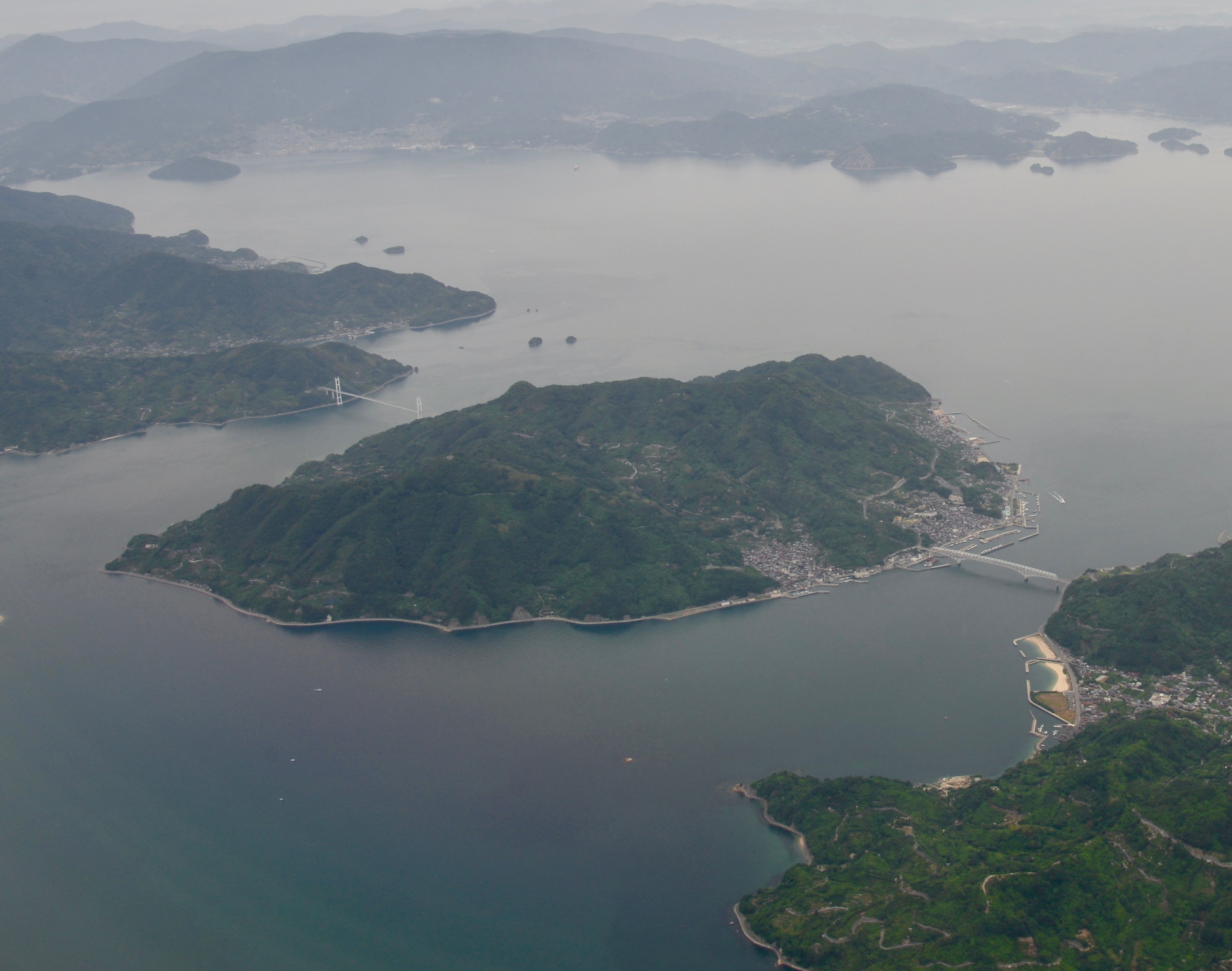 広島県呉市豊島 松山空港へ向かう機内にて撮影